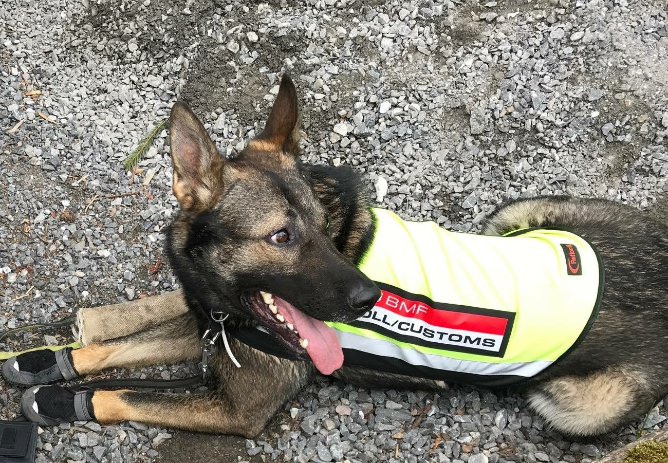 Diensthund des österreichischen Zolls